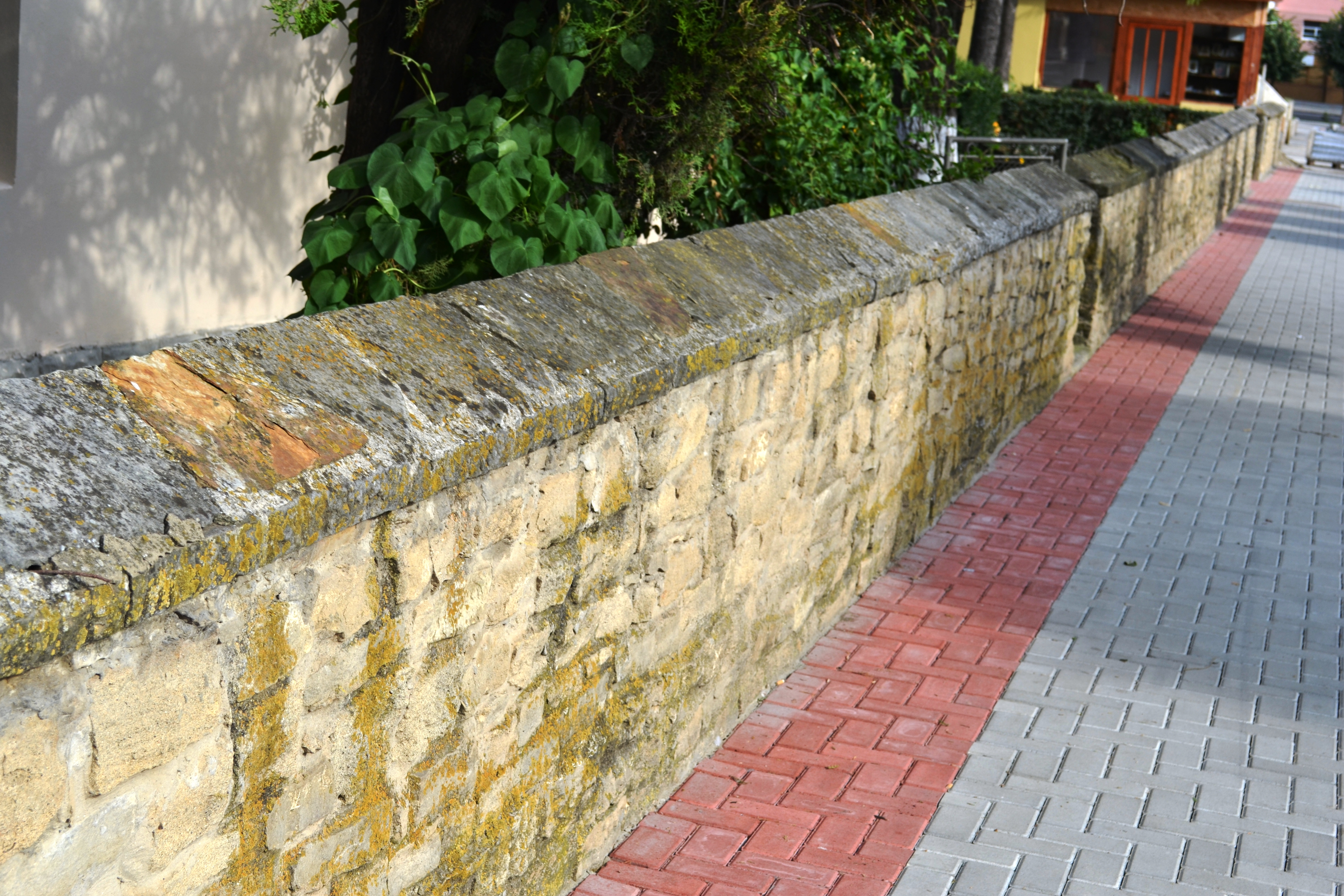 Zidul curtii ansamblului bisericii „Cuvioasa Paraschiva” din centrul orasului Tg. Frumos - jud. Iasi 02